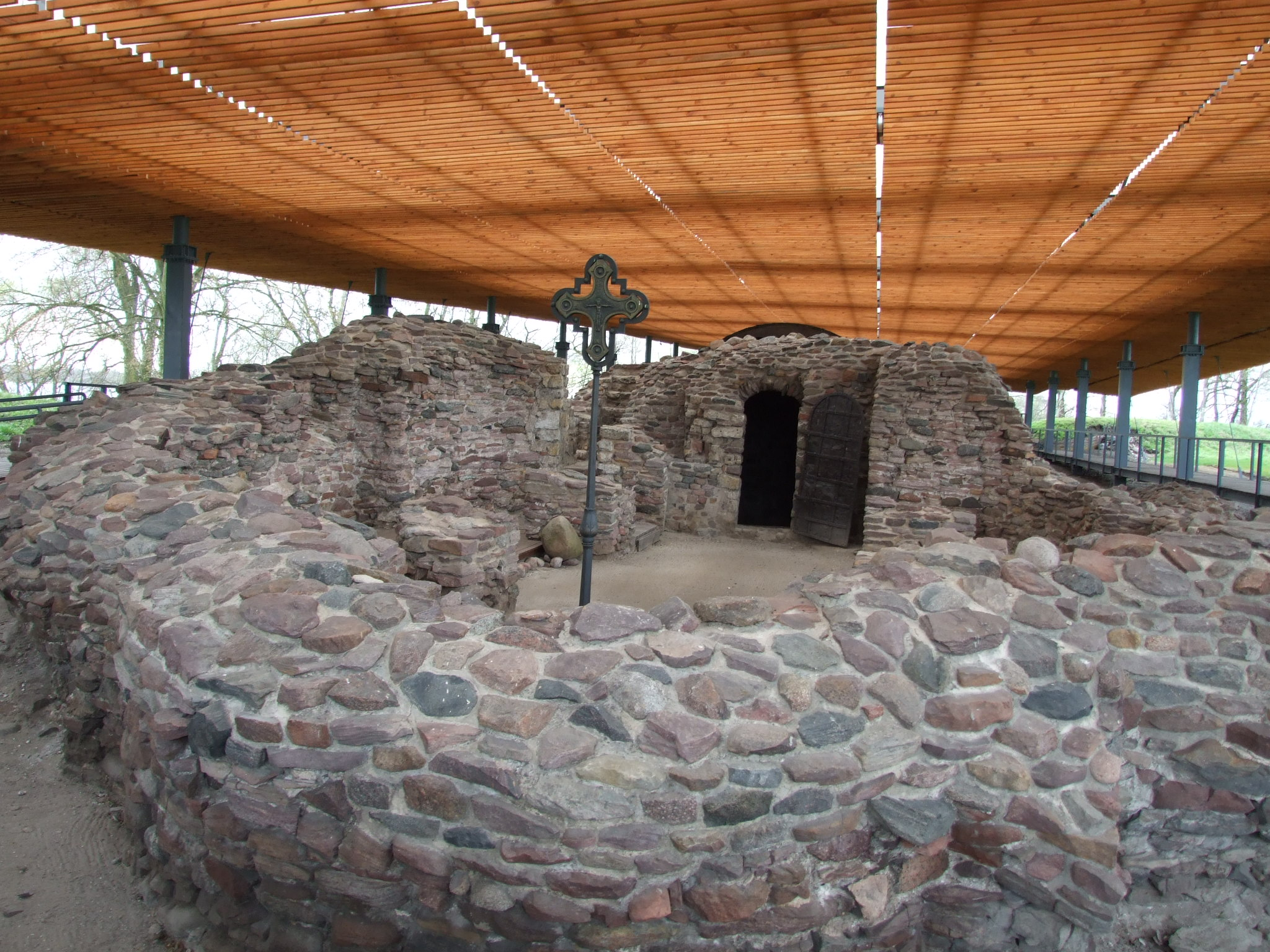 Ostrów Lednicki - ruiny palatium i kaplicy